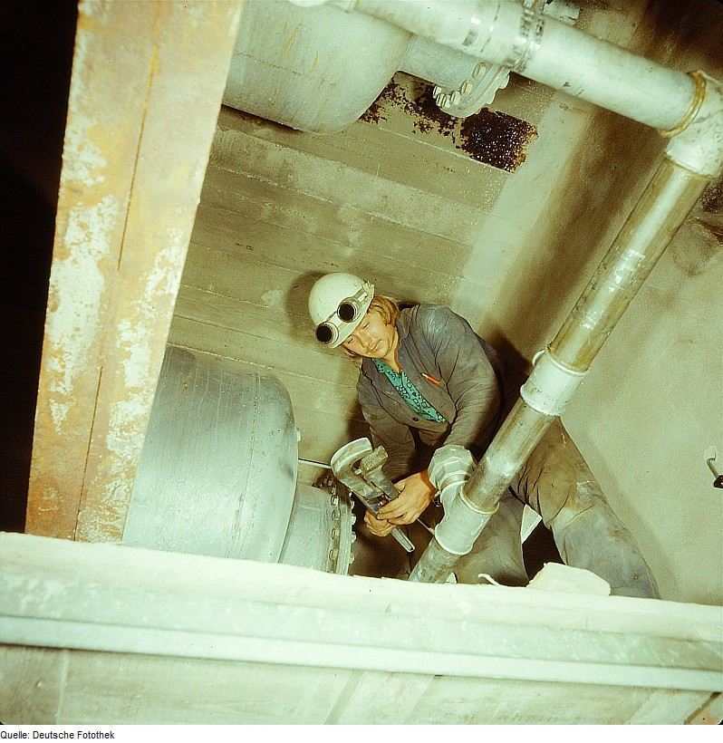 Original image description from the Deutsche Fotothek Installateur-Gas-Wasser, Schlachthof